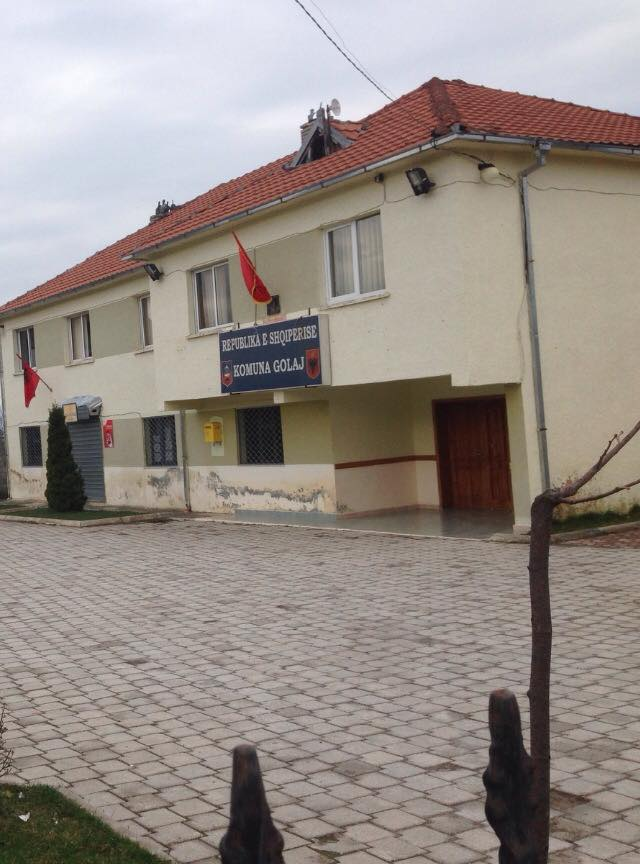 Komuna golaj